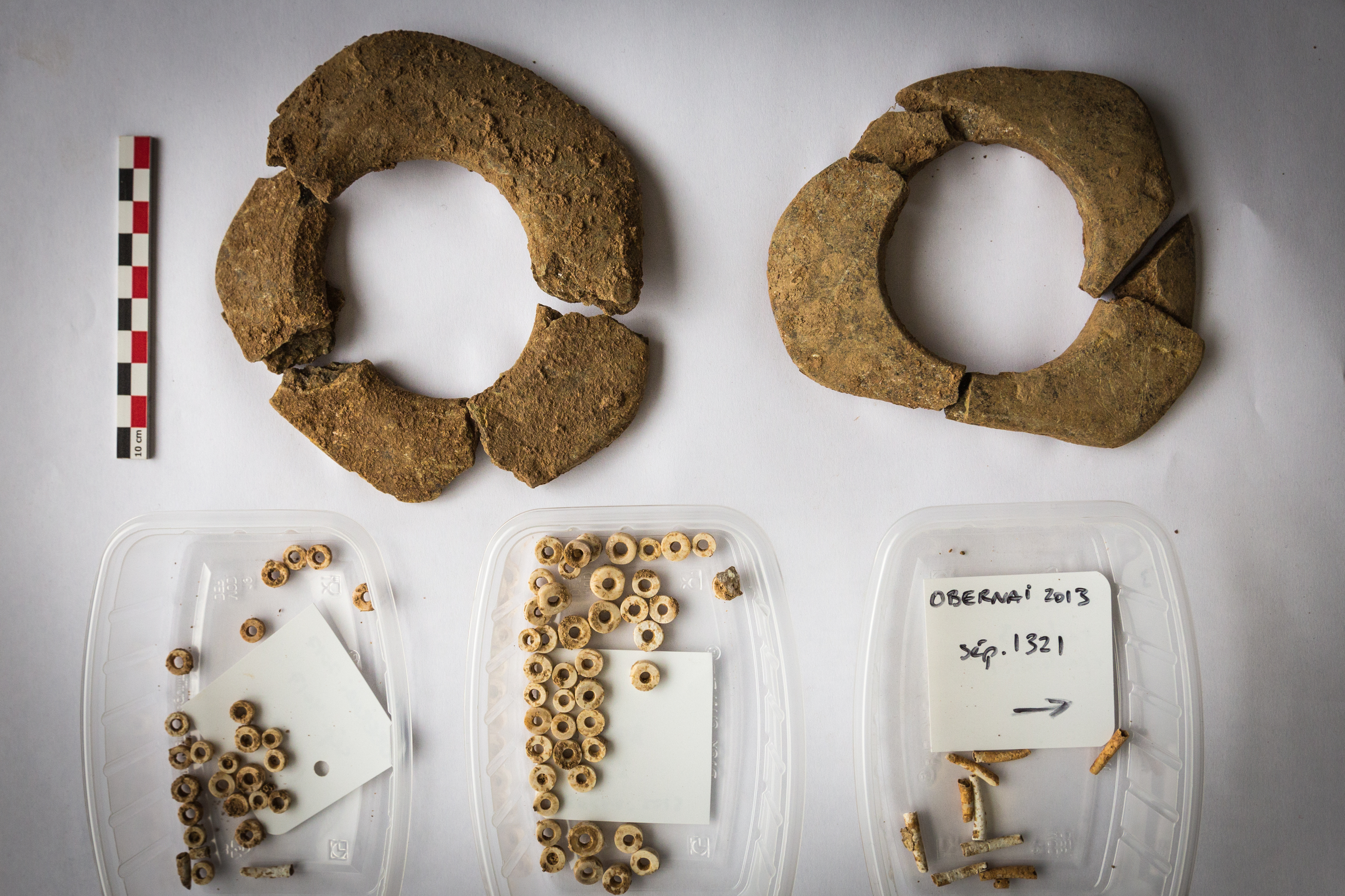 Anneaux-disques en pierre et perles de calcaire, Nécropole du Bas-empire. 4900 à 4750 ans avant notre ère. Un site archéologique d’exception à Obernai : plus de 6 000 ans d’occupation Dans le cadre de l’aménagement d’un Parc d’activités économiques à vocation industrielle par la communauté de communes du Pays de Sainte Odile, l’Inrap vient d’achever, sur prescription de l’État (DRAC Alsace), une importante fouille à Obernai. Sur plus de 7,5 hectares, se succèdent des sociétés néolithique, gauloise, gallo-romaine, mérovingienne. La fouille archéologique de ce site apporte de nouveaux éclairages sur l’évolution cultuelle et les mouvements de population sur près de six millénaires, mais aussi sur l’organisation territoriale de l’Alsace.